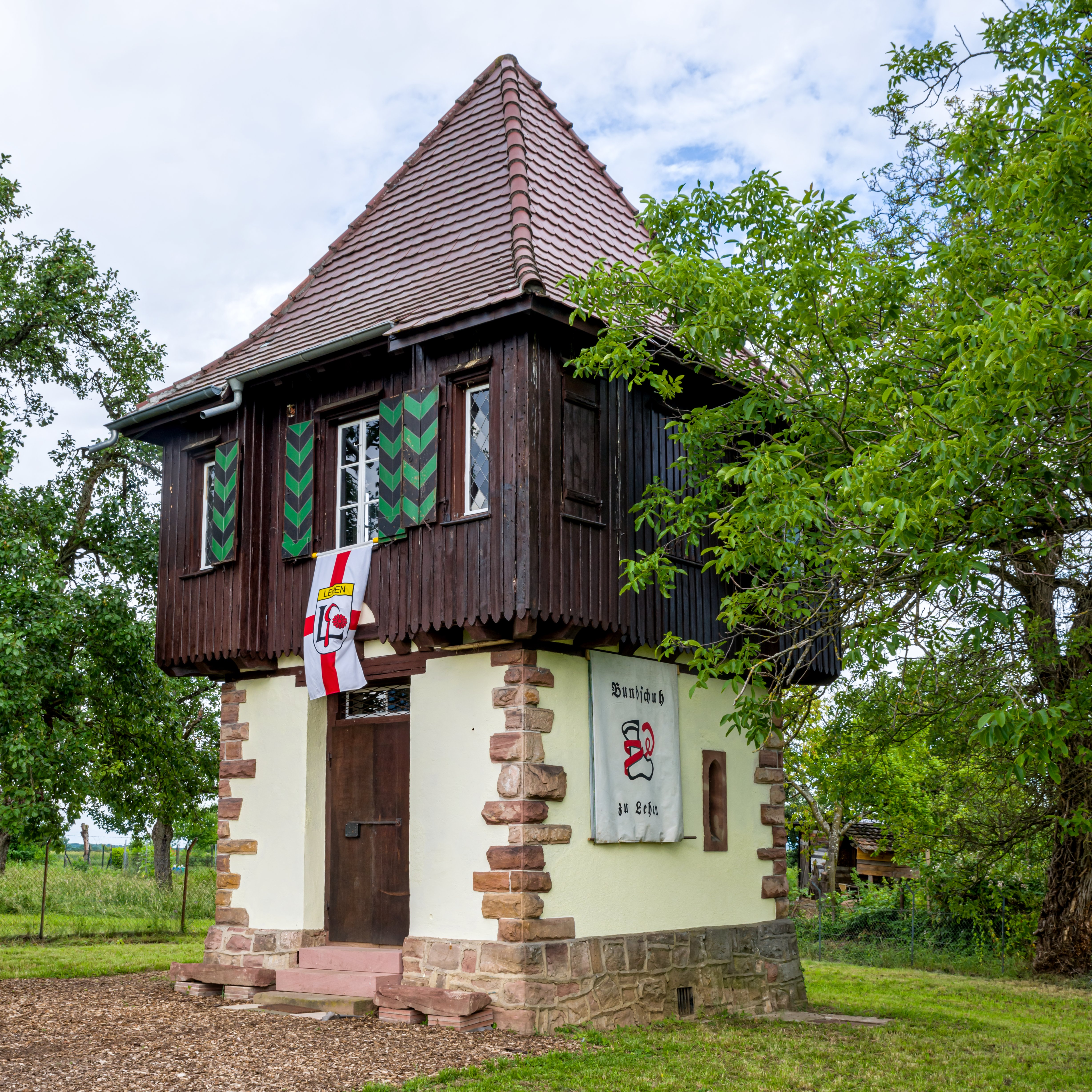 Bilder aus Freiburg im Breisgau Das Herdertürmle am 15-06-2019. Am Tag der offenen Tür, nach der Restaurierung durch den „Bundschuh zu Lehen e. V.“